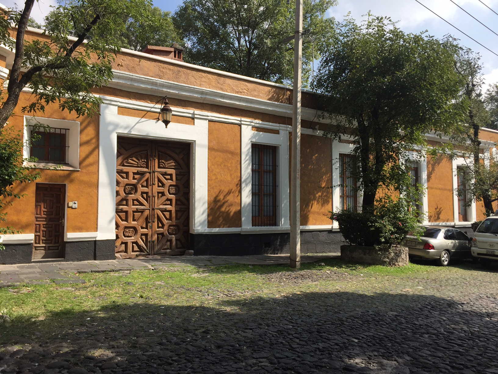 Casona pintada de amarillo con marcos y pretil en blanco, ubicada sobre una calle empedrada típicas del centro de las delegaciones, San Angel, Ciudad de México, México.